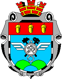 Герб города Попасная (Луганская область)